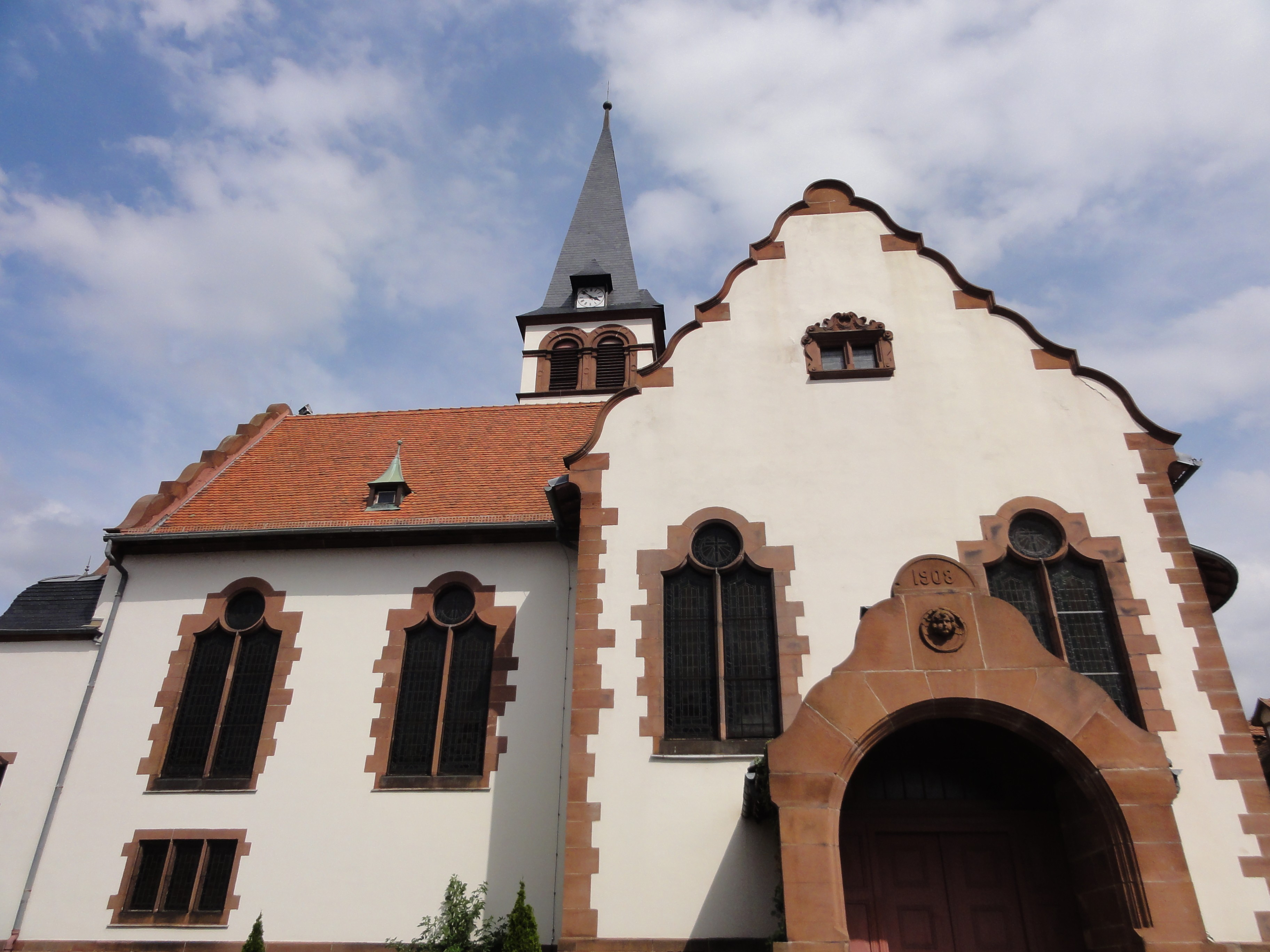 Alsace, Bas-Rhin, Église protestante de Lingolsheim, rue du Château (IA00024146).